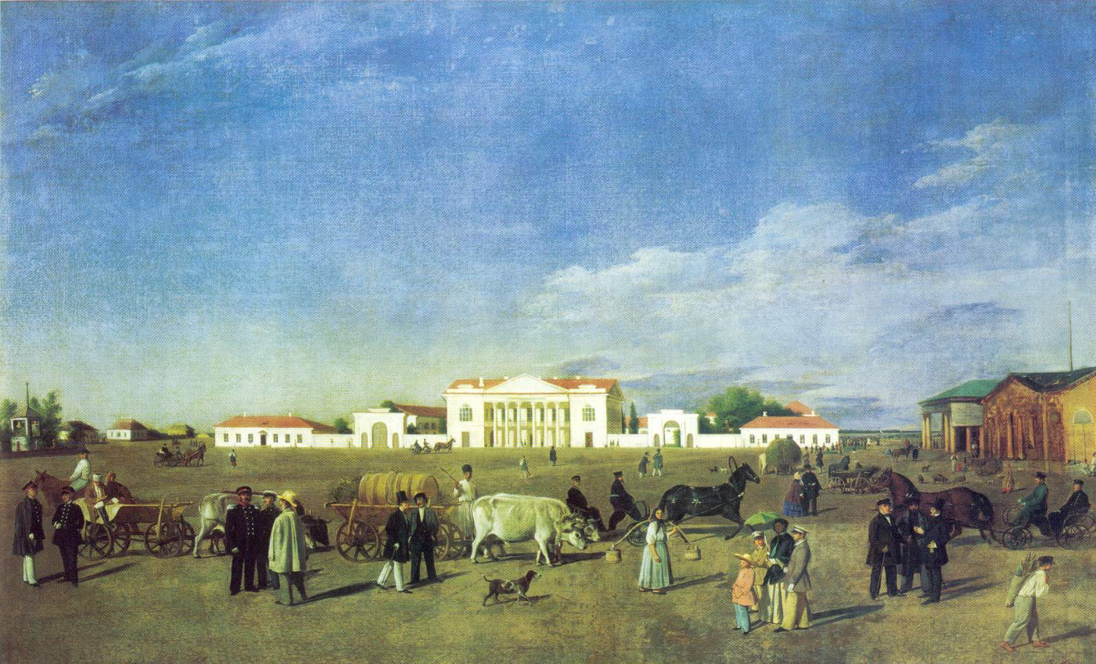 Александровская площадь в Полтаве. 1830-е.